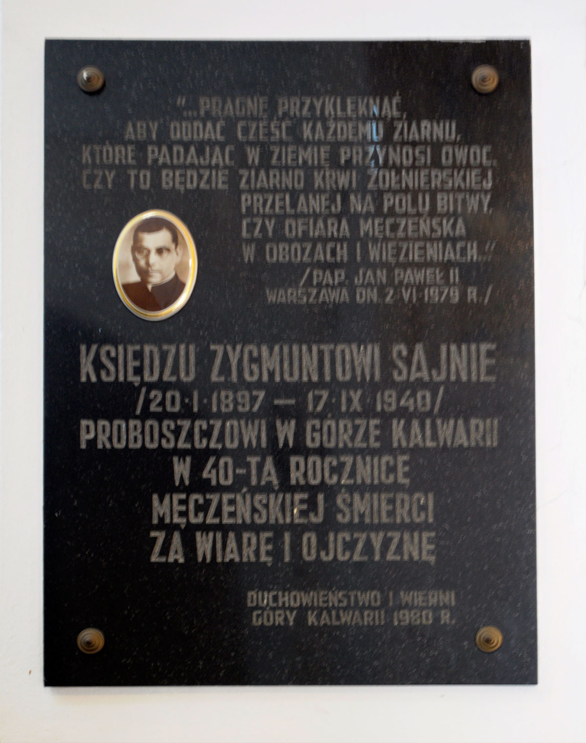 Góra Kalwaria - wnętrze kościoła pobernardyńskiego p.w. Niepokalanego Poczęcia NMP (zabytek nr 1016/364/62)